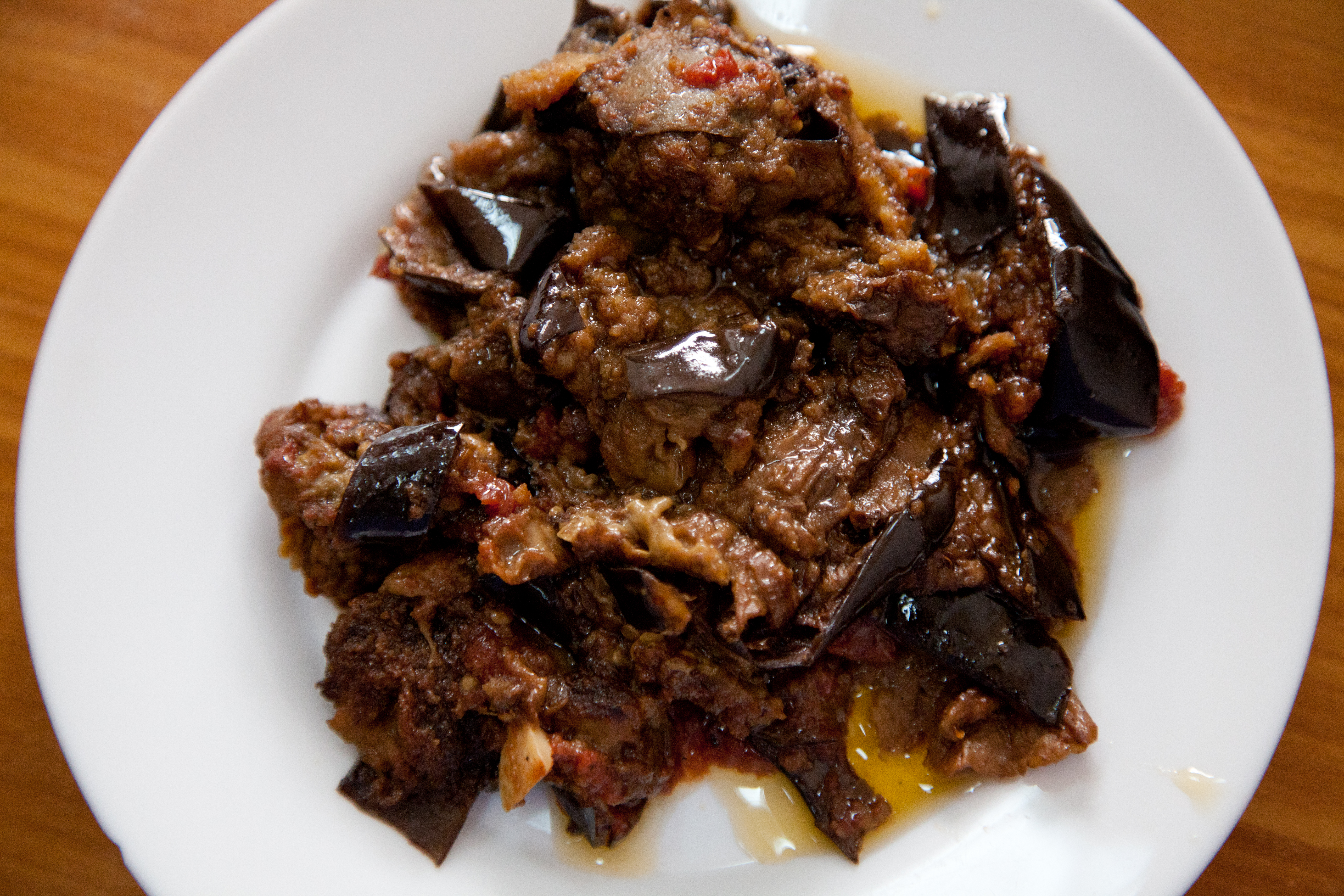 Sofia; gebratene Auberginen